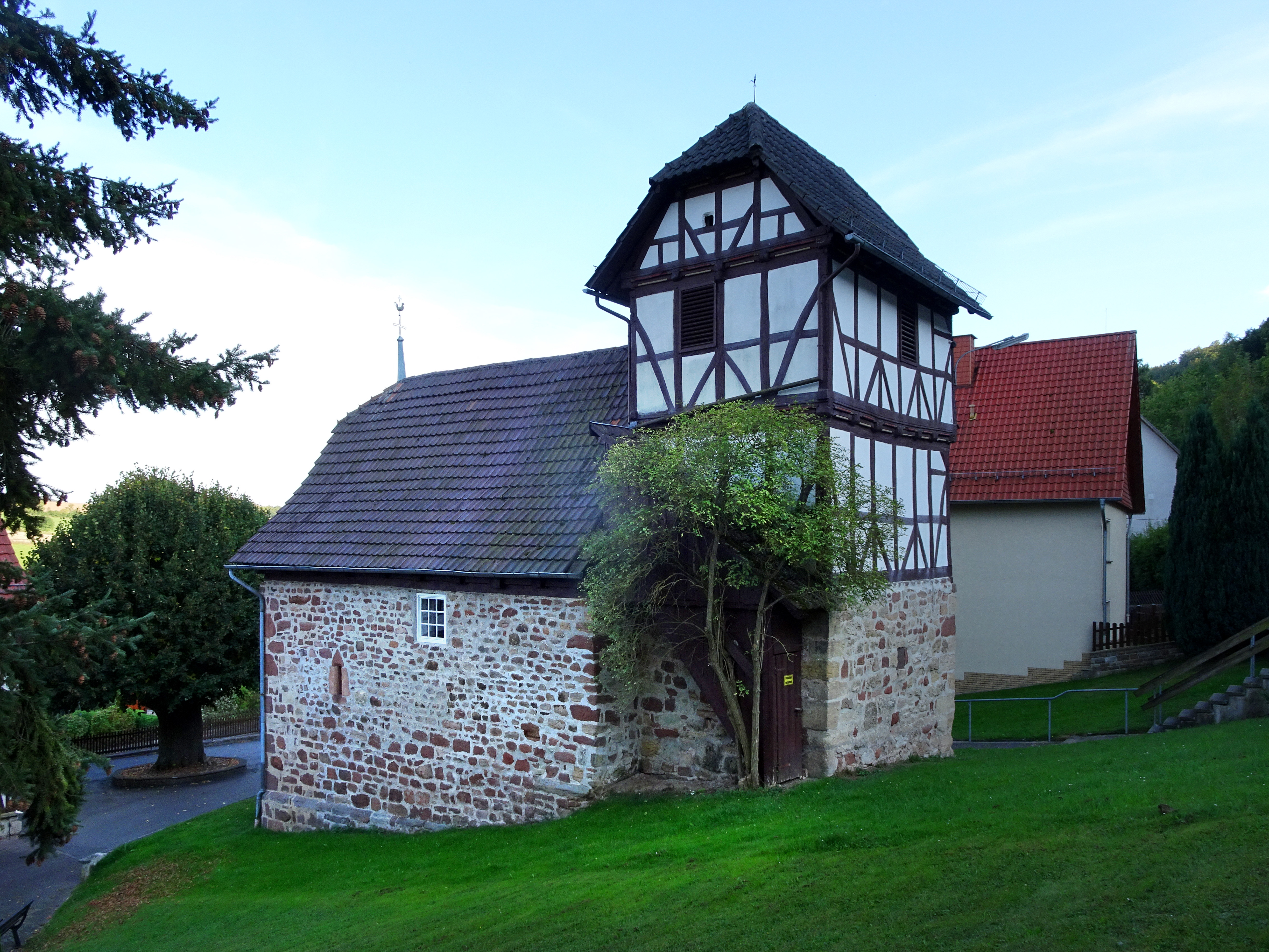 Die evangelische Pfarrkirche in Weißenborn, mit erhaltenen Außenmauern des Schiffes und Turmuntergeschosses aus dem 13. Jahrhundert. Der Fachwerkaufbau des Turmes wurde vermutlich um 1700 errichtet. Weißenborn ist ein Stadtteil von Sontra im nordhessischen Werra-Meißner-Kreis.